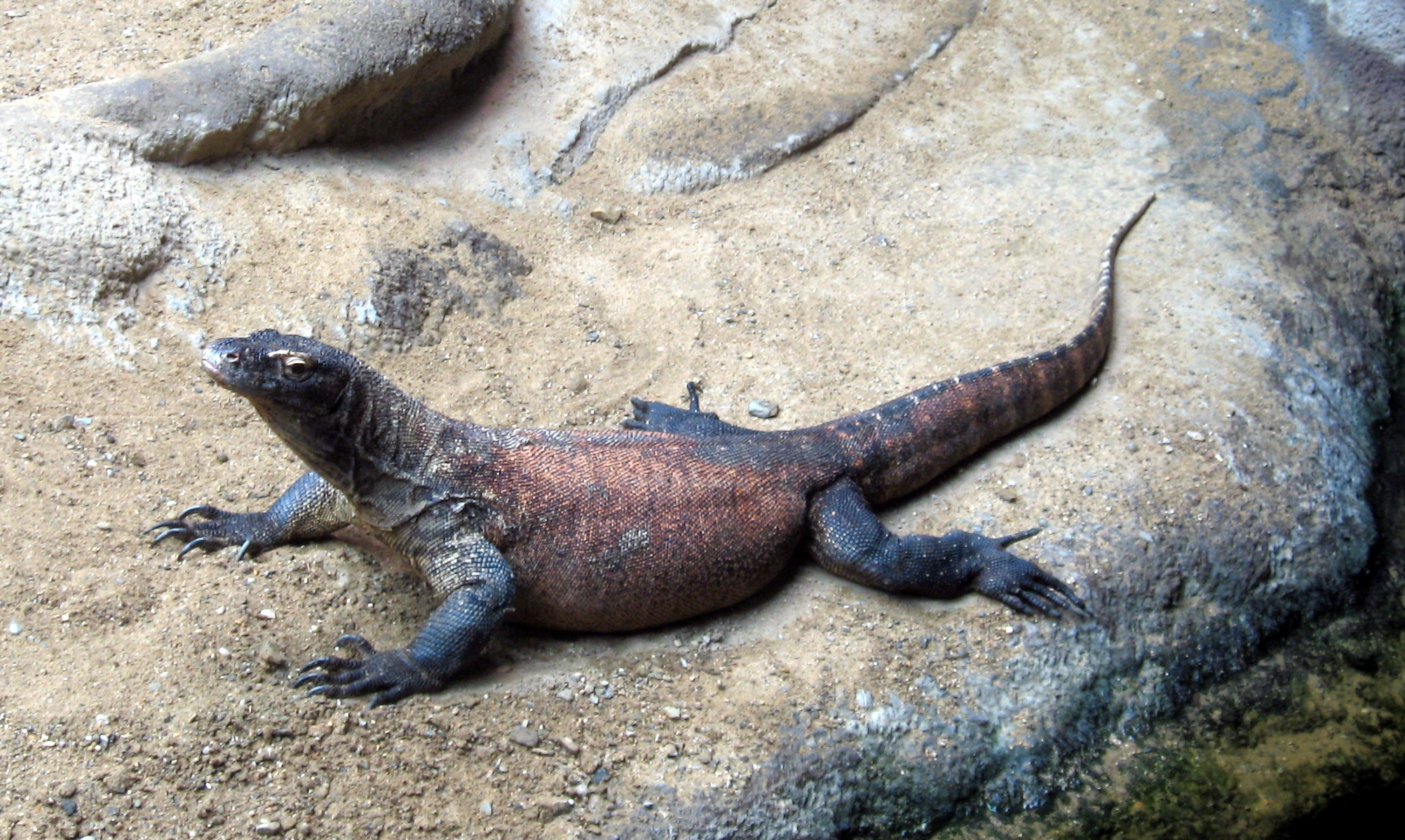 Varanus komodoensis Česky: Varan komodský